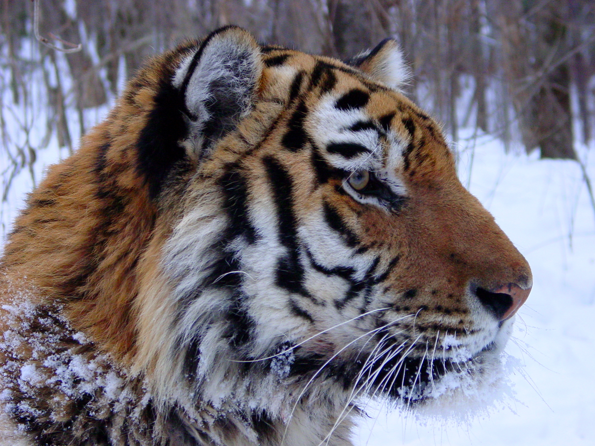 Amur tiger in winter. Credit: John Goodrich/WCS